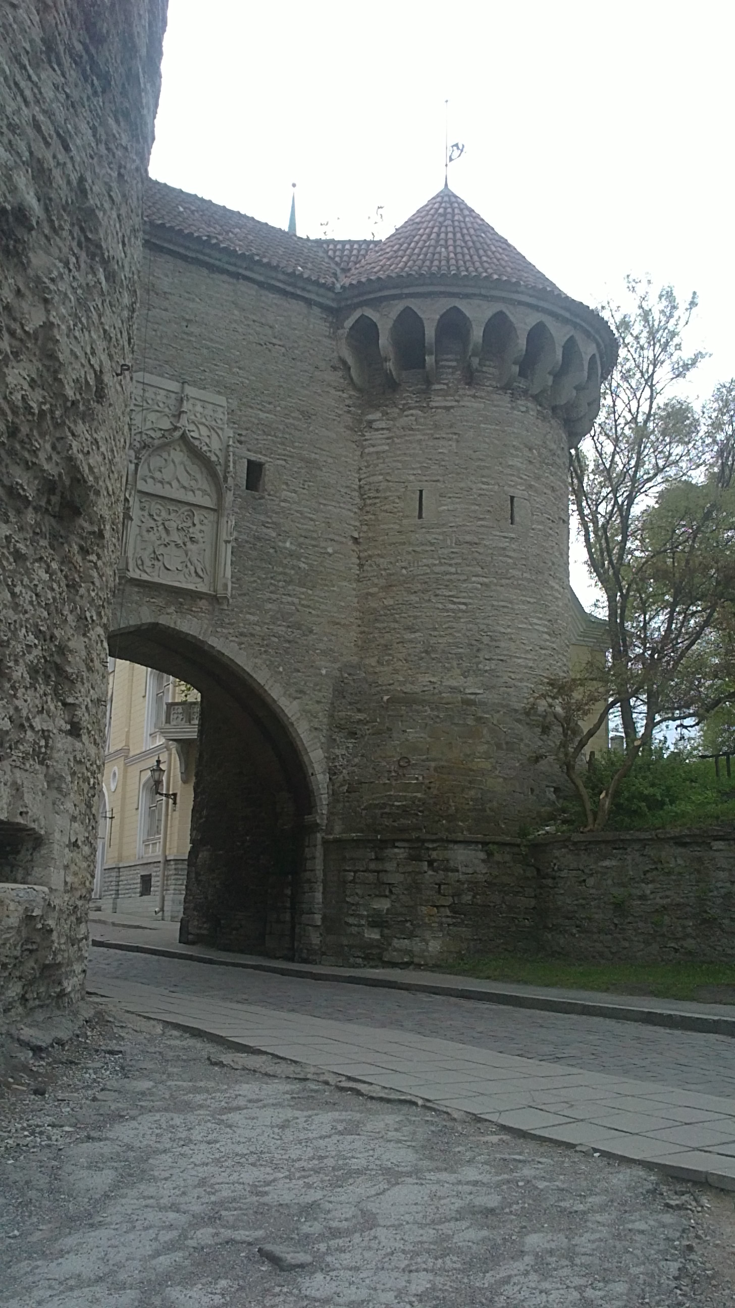 Tallinna linnamüüri kuulunud Suur Rannavärav